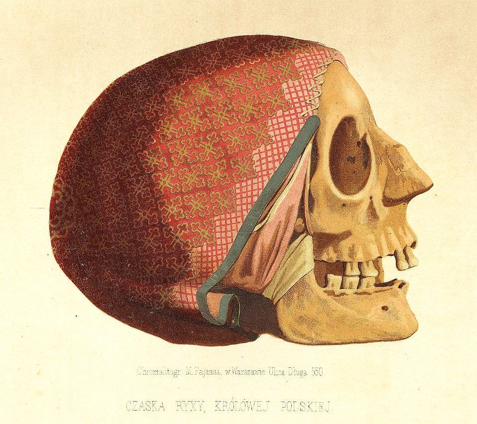 Czaszka Rychezy Lotaryńskiej